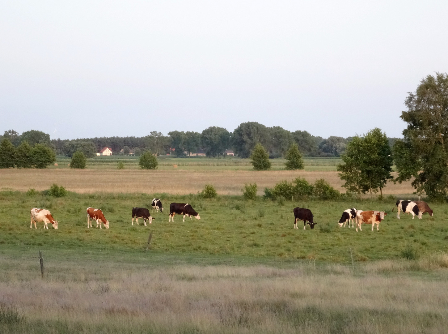 Januszkowo, gmina Nowa Wieś Wielka, powiat bydgoski